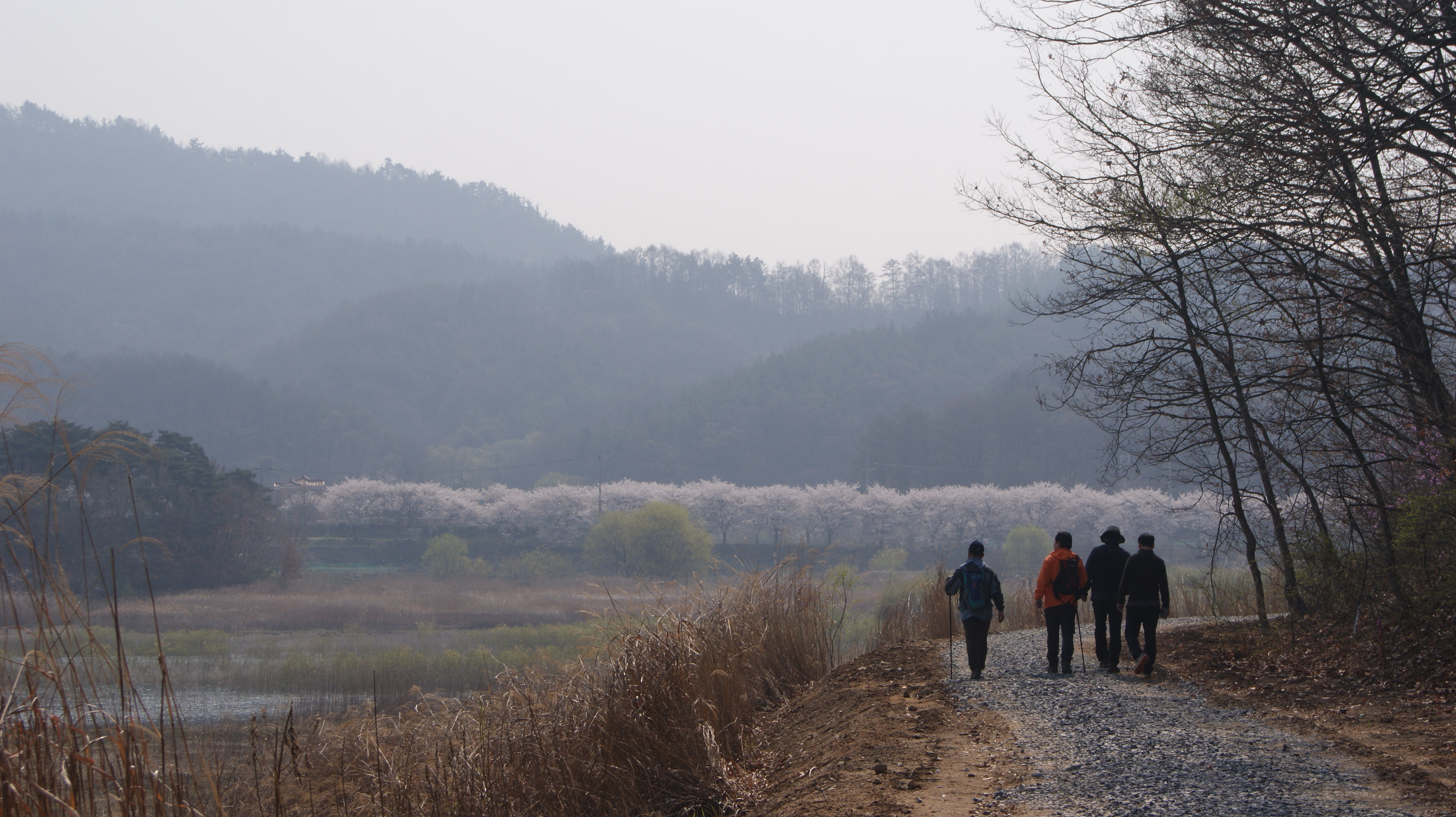 대청호오백리길 5구간_5